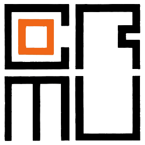 Emblema de la Corporación de Mejoramiento Urbano (CORMU), entidad pública chilena existente hasta 1976